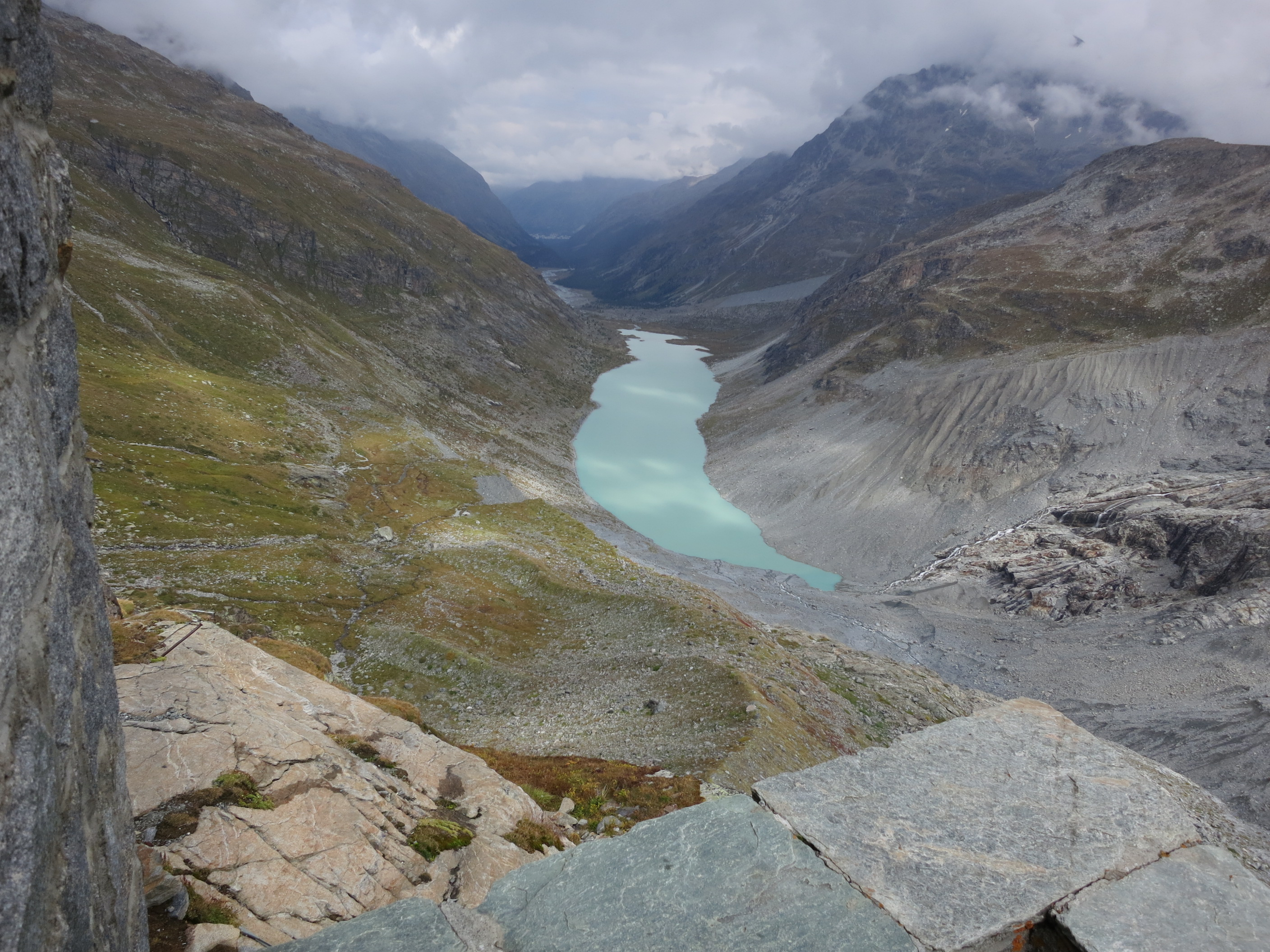 Coazhütte, Val Roseg, Samedan GR, Schweiz